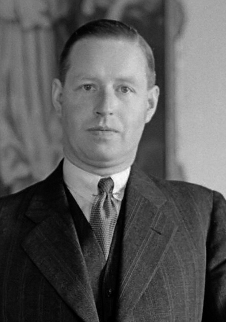 De Nederlandse gezant in Brussel, Jhr. A.W.L. Tjarda van Starkenborgh Stachouwer 1935